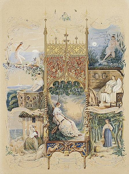 Hermann Wilhelm Soltau: "Nähe des Geliebten". Illustration zu Goethes gleichnamigem Gedicht. Weiß- und goldgehöhtes Aquarell in Deckfarben 1845. 64 x 46,7 cm.